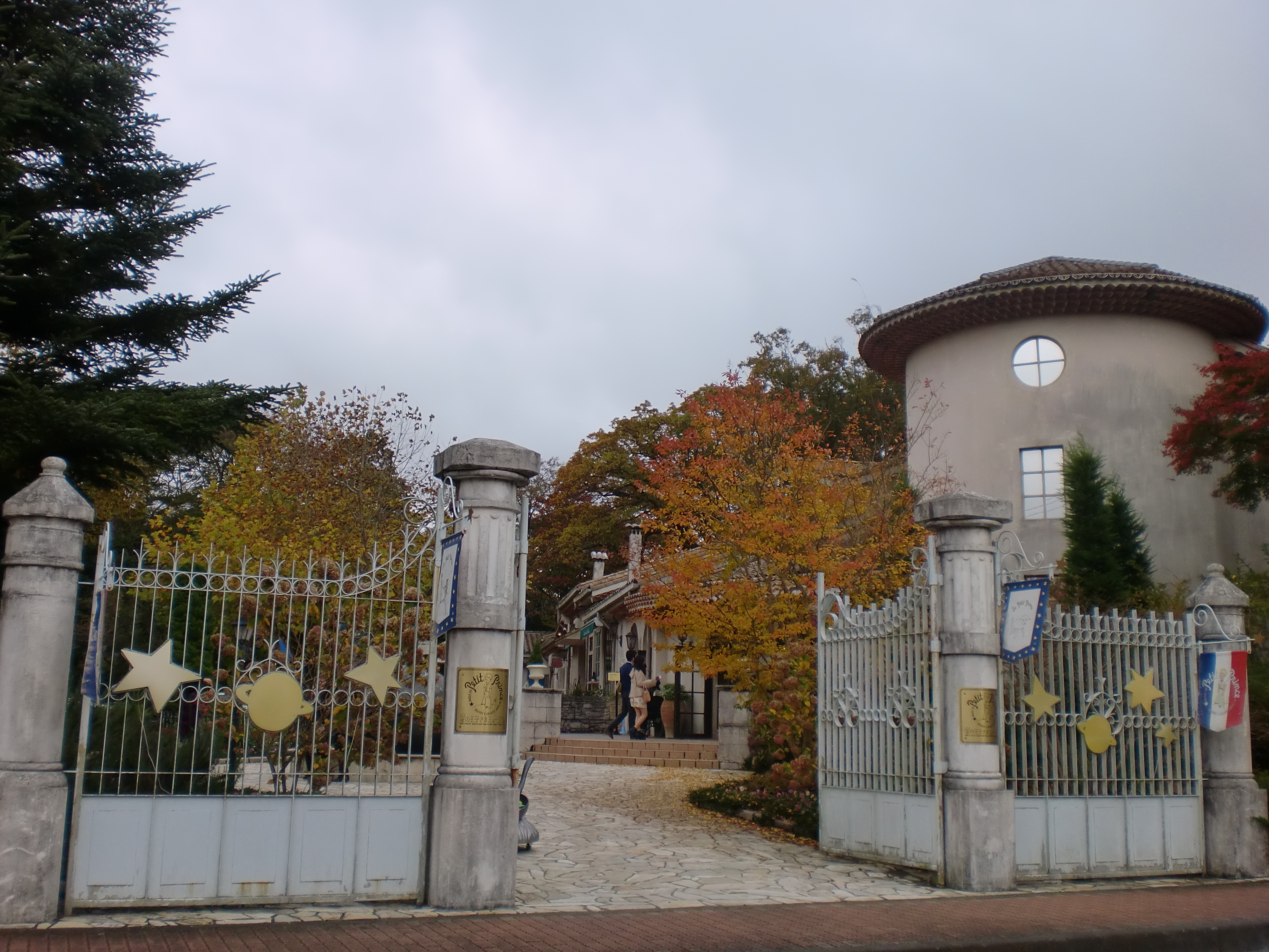 Musée du Petit Prince de Saint-Exupéry à Hakone